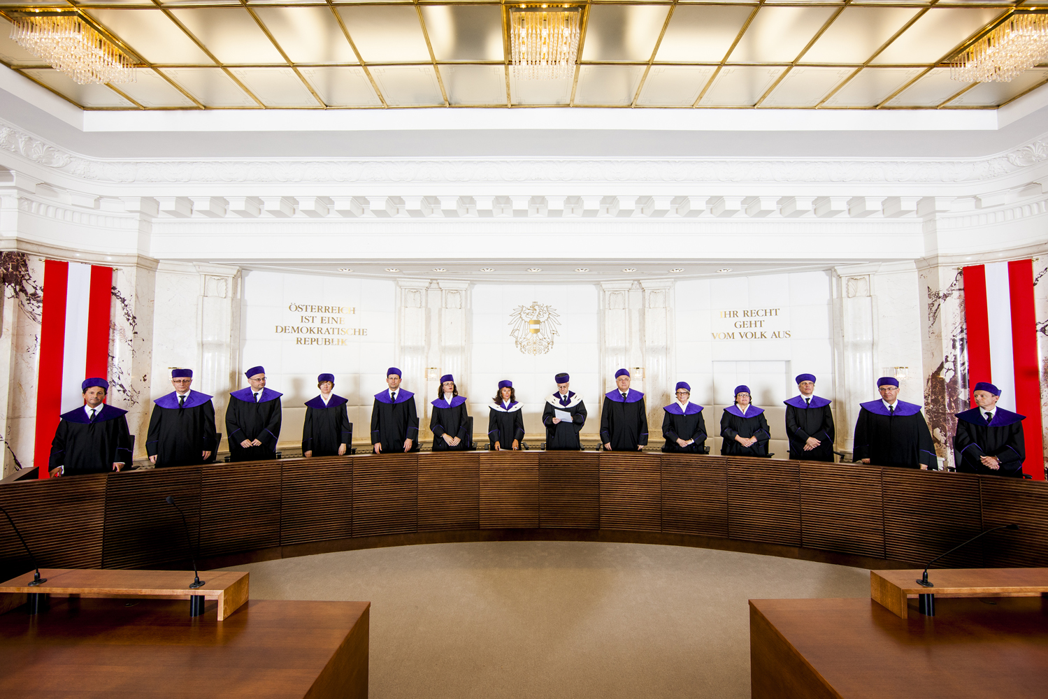 Verhandlungssaal des österreichischen Verfassungsgerichtshofs. Richter bei der mündlichen Erkenntnisverkündung im Jahr 2013.V.l.n.r.: Christoph Herbst, Georg Lienbacher, Michael Holoubek, Ingrid Siess-Scherz, Christoph Grabenwarter, Sieglinde Gahleitner, Vizepräsidentin Brigitte Bierlein, Präsident Gerhart Holzinger, Rudolf Müller, Eleonore Berchtold-Ostermann, Claudia Kahr, Johannes Schnizer, Helmut Hörtenhuber, Markus Achatz